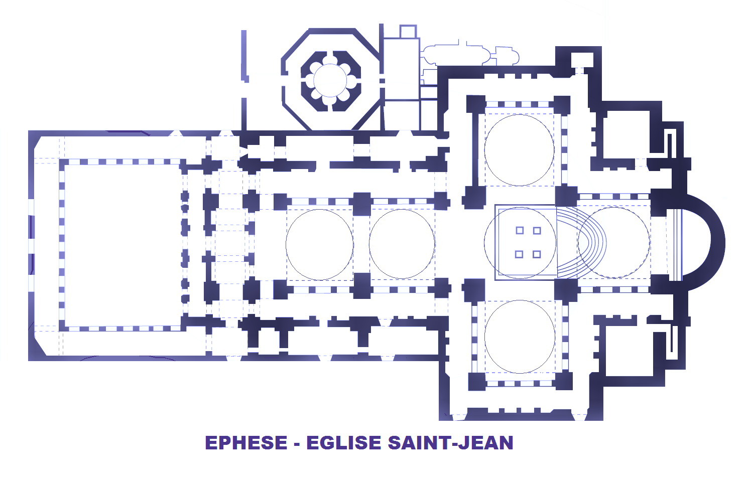 Ephèse, église Saint-Jean (image Commons modifiée)